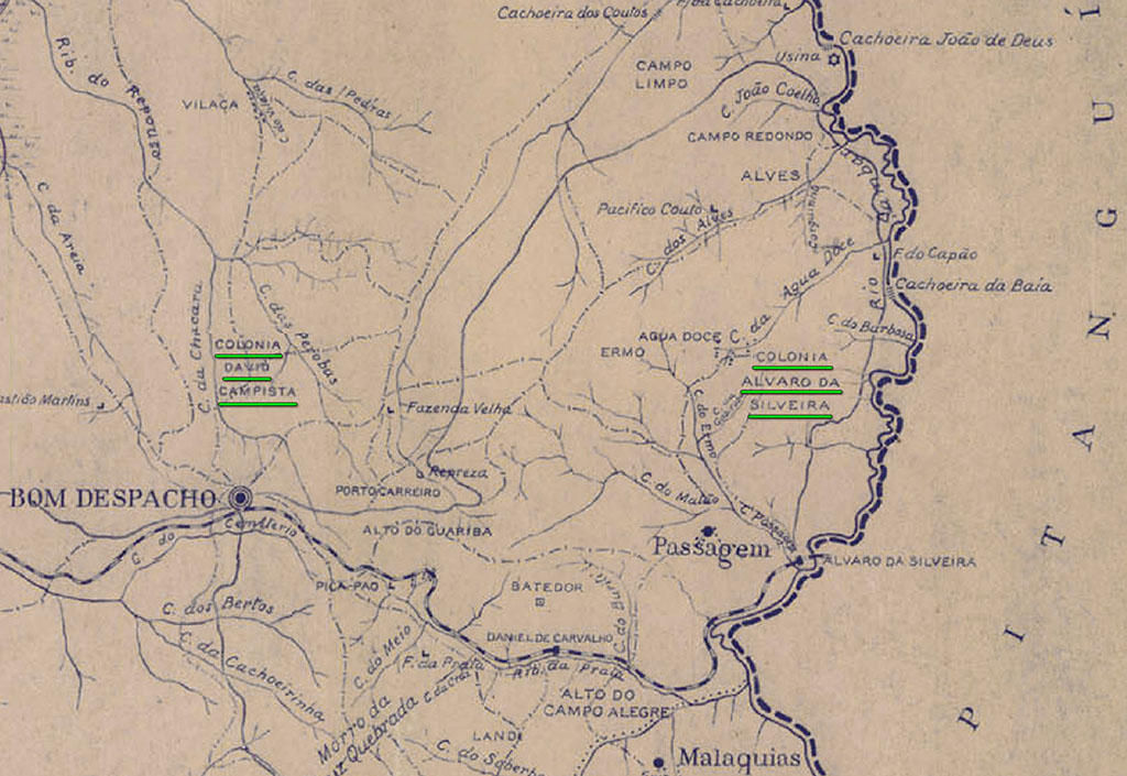 MAPA DO ESTADO DE MINAS GERAIS - MUNICÍPIO DE BOM DESPACHO - Parte localizando as colônias David Campista e Álvaro da Silveira - 1939